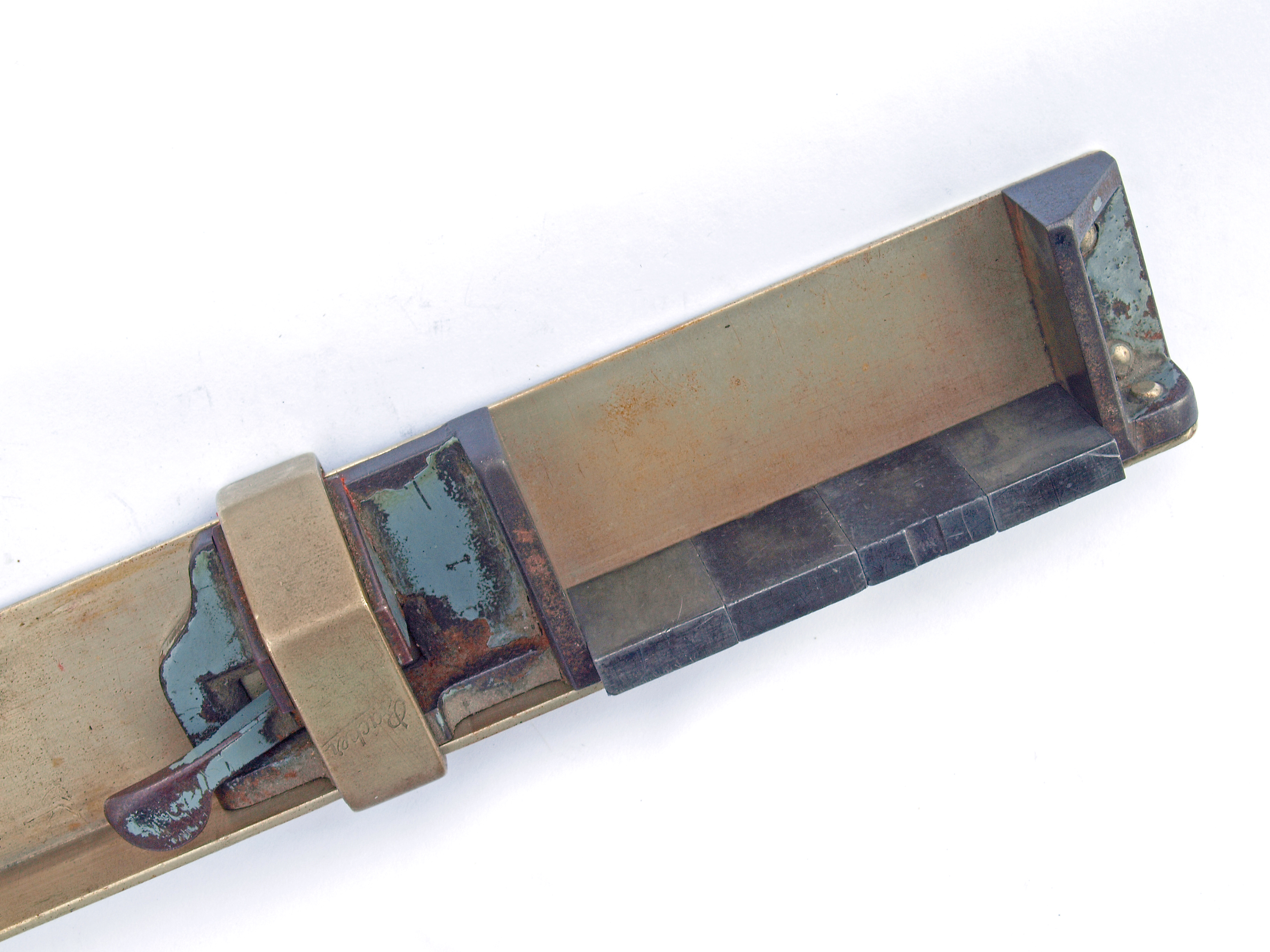 Winkelhaken für den Handsatz, eingestellt mit 4 x 4 Cicero Quadraten auf eine Satzbreite von 16 Cicero